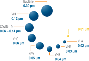 Tailles des différents virus et bactéries pouvant être présents dans les fumées chirurgicales